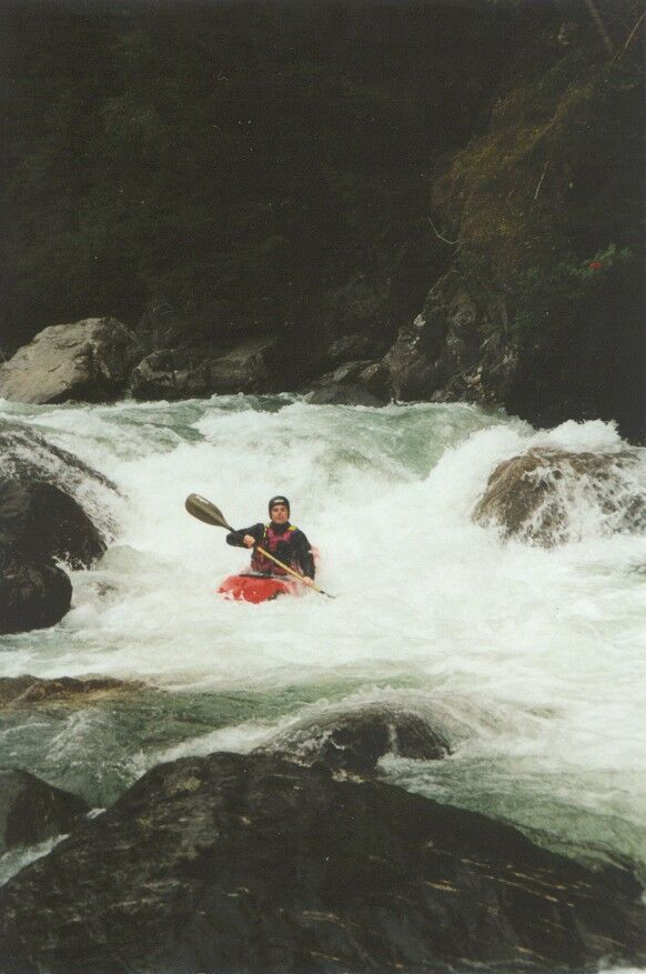 Trisanna, Tirol